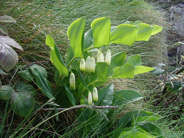 Polygonatum odoratum, falaises du Cap Sizun (Finistère, France)